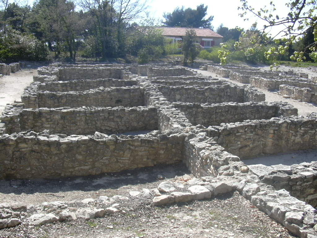 Vue des ruines de l'Oppidum d'Entremont, Aix-en-Provence, France